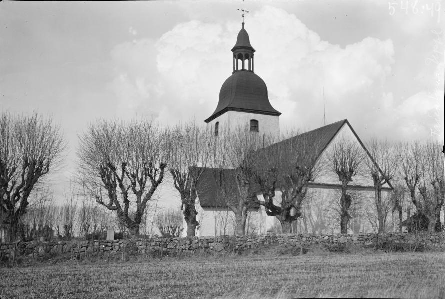 Kyrkan mot sydväst.